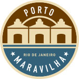 Logotipo do projeto Porto Maravilha.